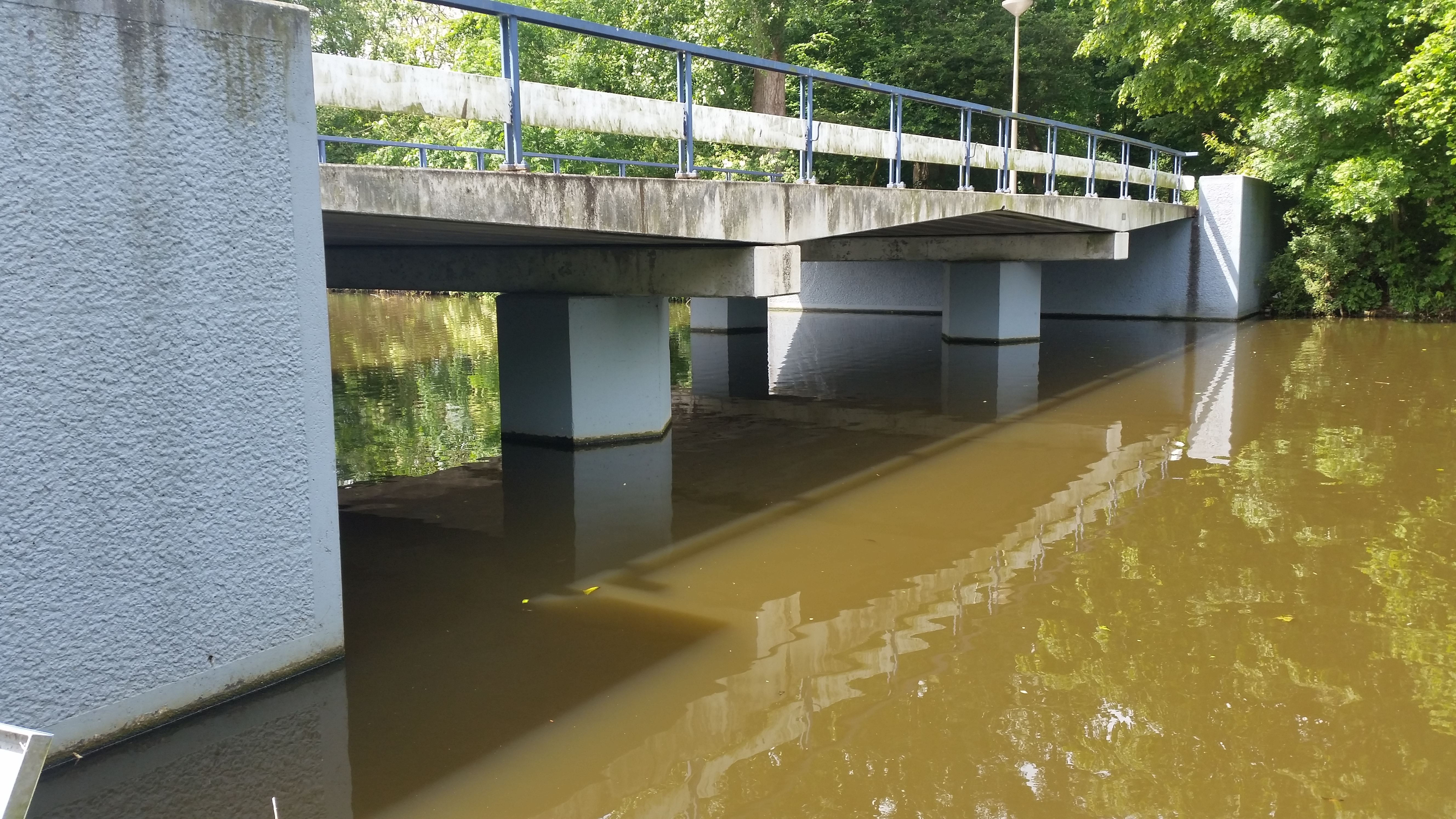 Zijaanzicht van onderkant van Brug 986 (in Amsterdam)